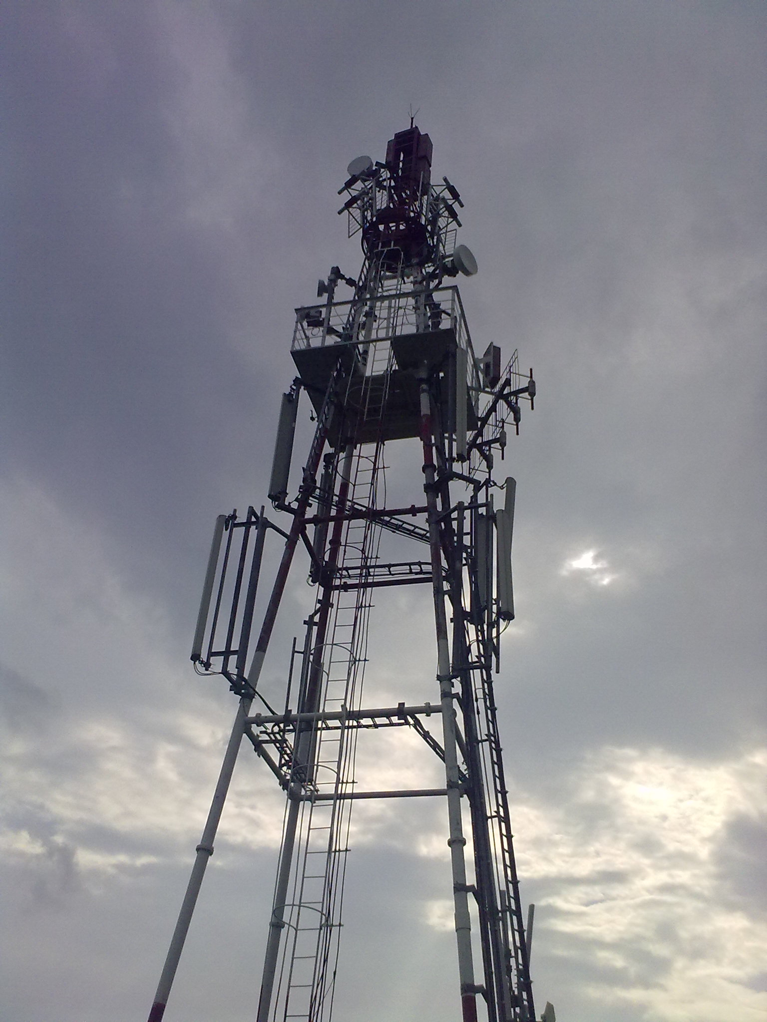 Wieża przekaźnikowa na górze „Makówka” w miejscowości Tarnawa Górna (podkarpackie). Na maszcie przekaźniki TVP1, TVP2, Orange, Plus, Play, T-Mobile, ZUT Zagórz (internet Wi-Fi).